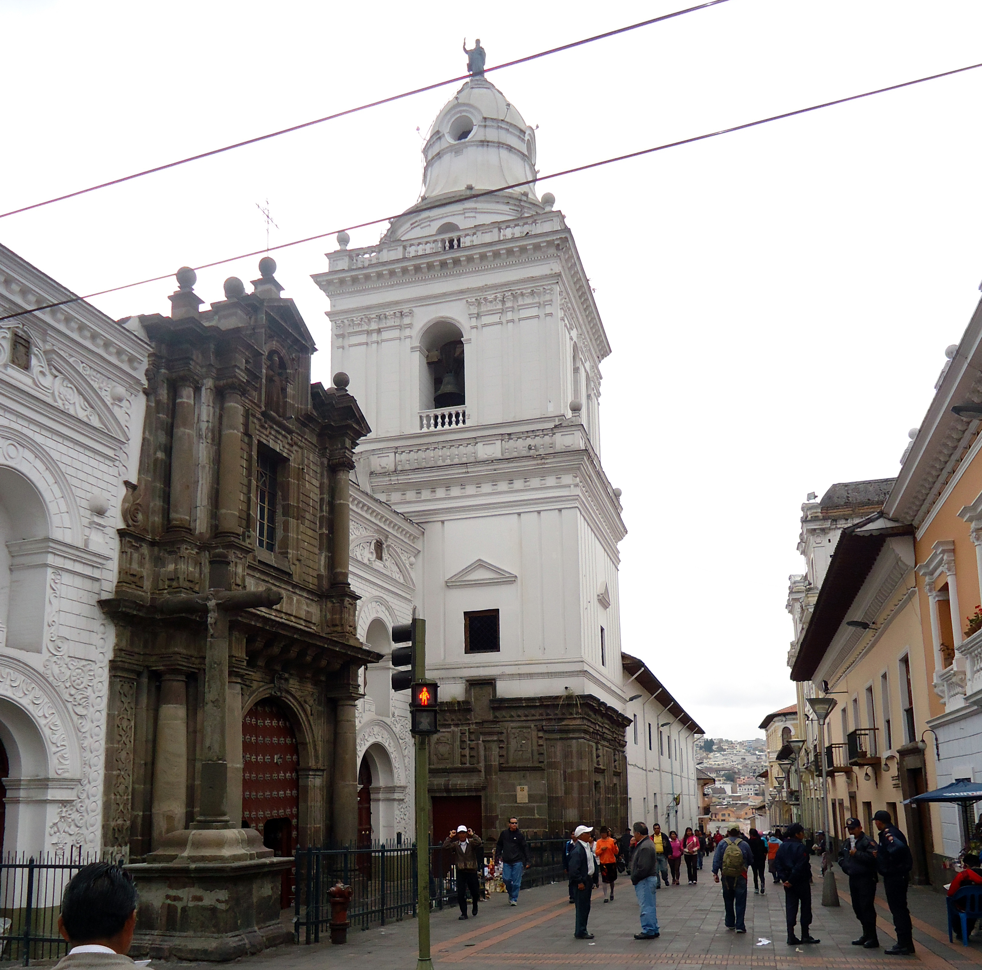 Iglesia de San Agustín - Quito